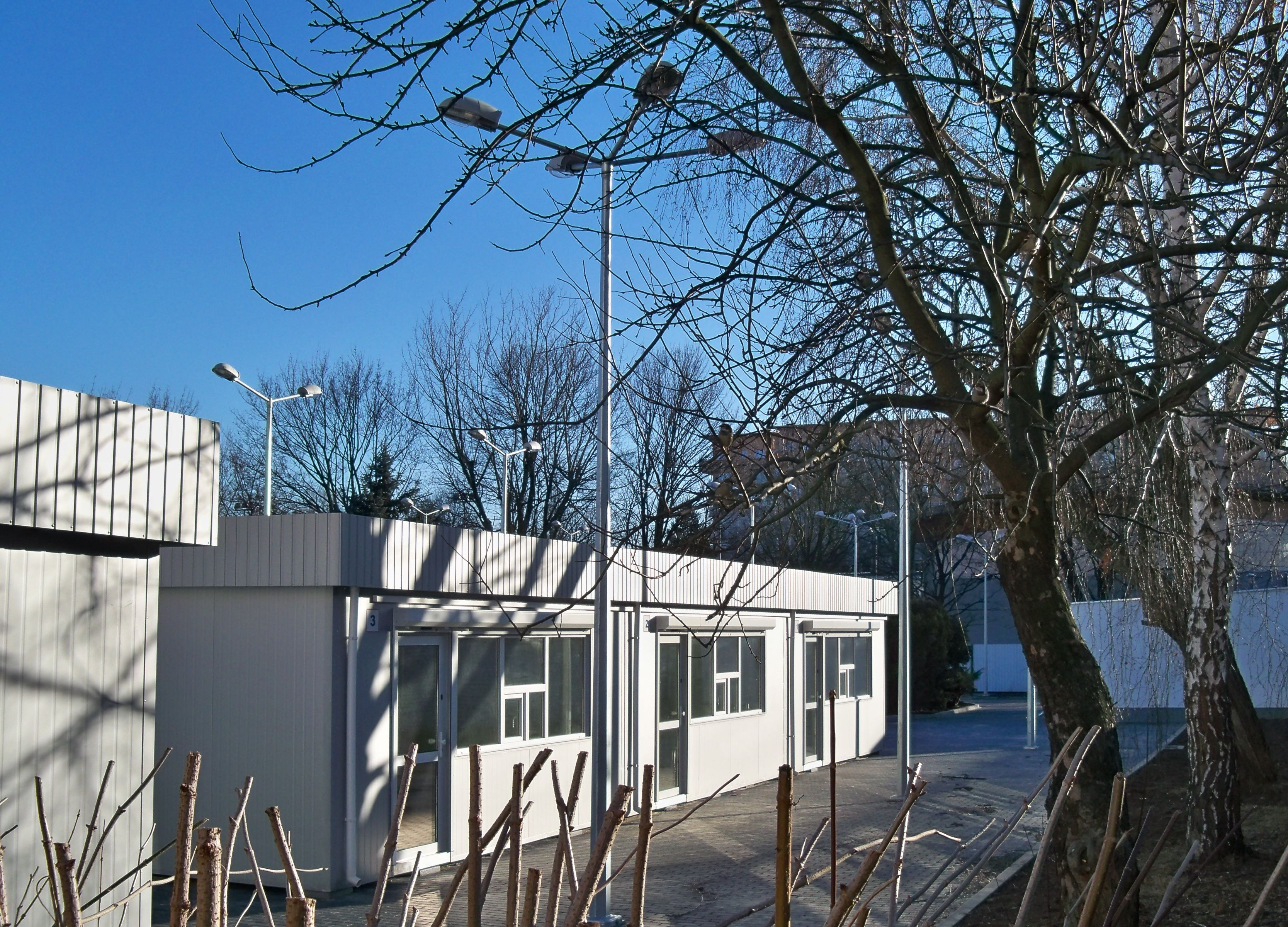 Pawilony na miasteczku ruchu drogowego przy ul. Skorochód-Majewskiego w Warszawie przewidziane na tymczasową lokalizację modernizowanego Targowiska Banacha